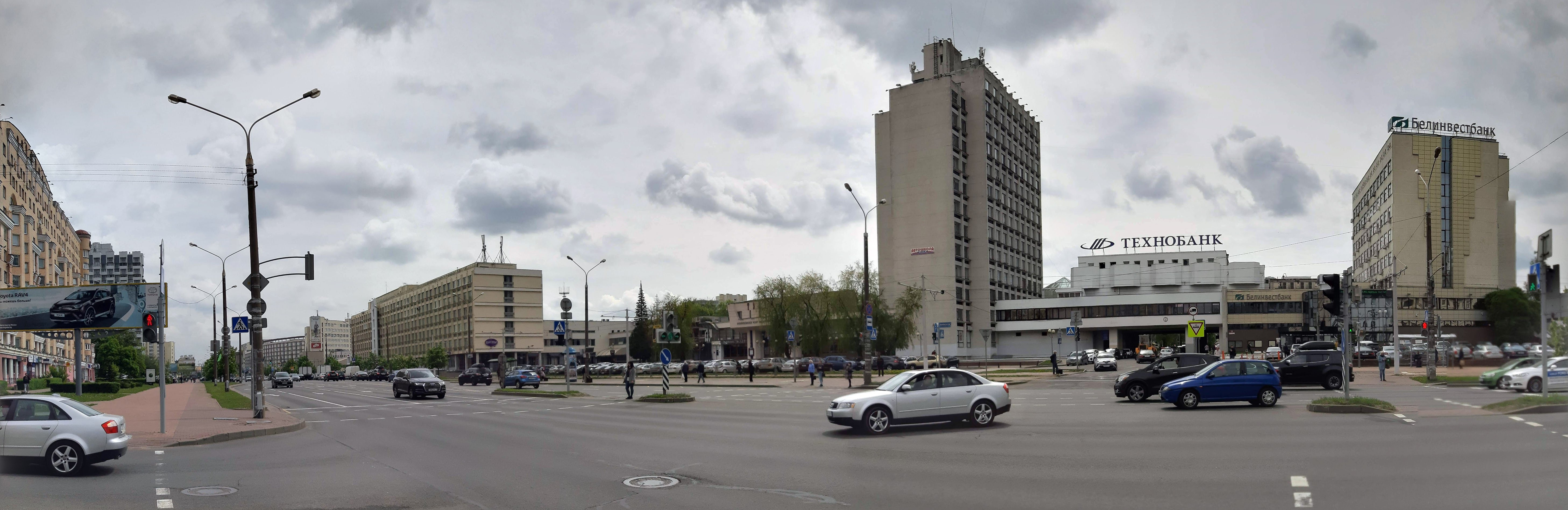 Мінск. Старажоўка